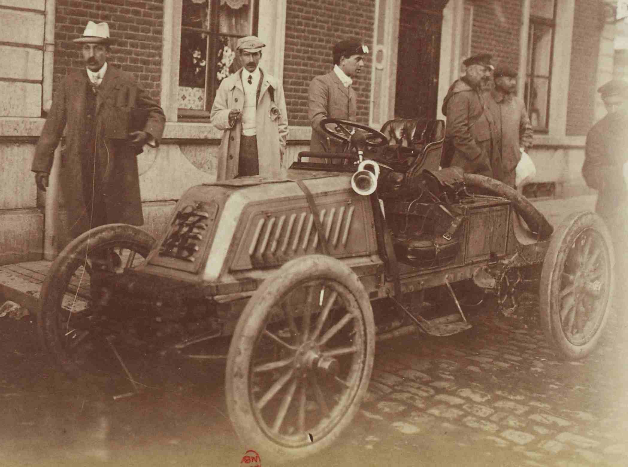 [Collection Jules Beau. Photographie sportive] : T. 18. Année 1902 / Jules Beau : F. 44. [Circuit des Ardennes, Bastogne, 30 juillet 1902]